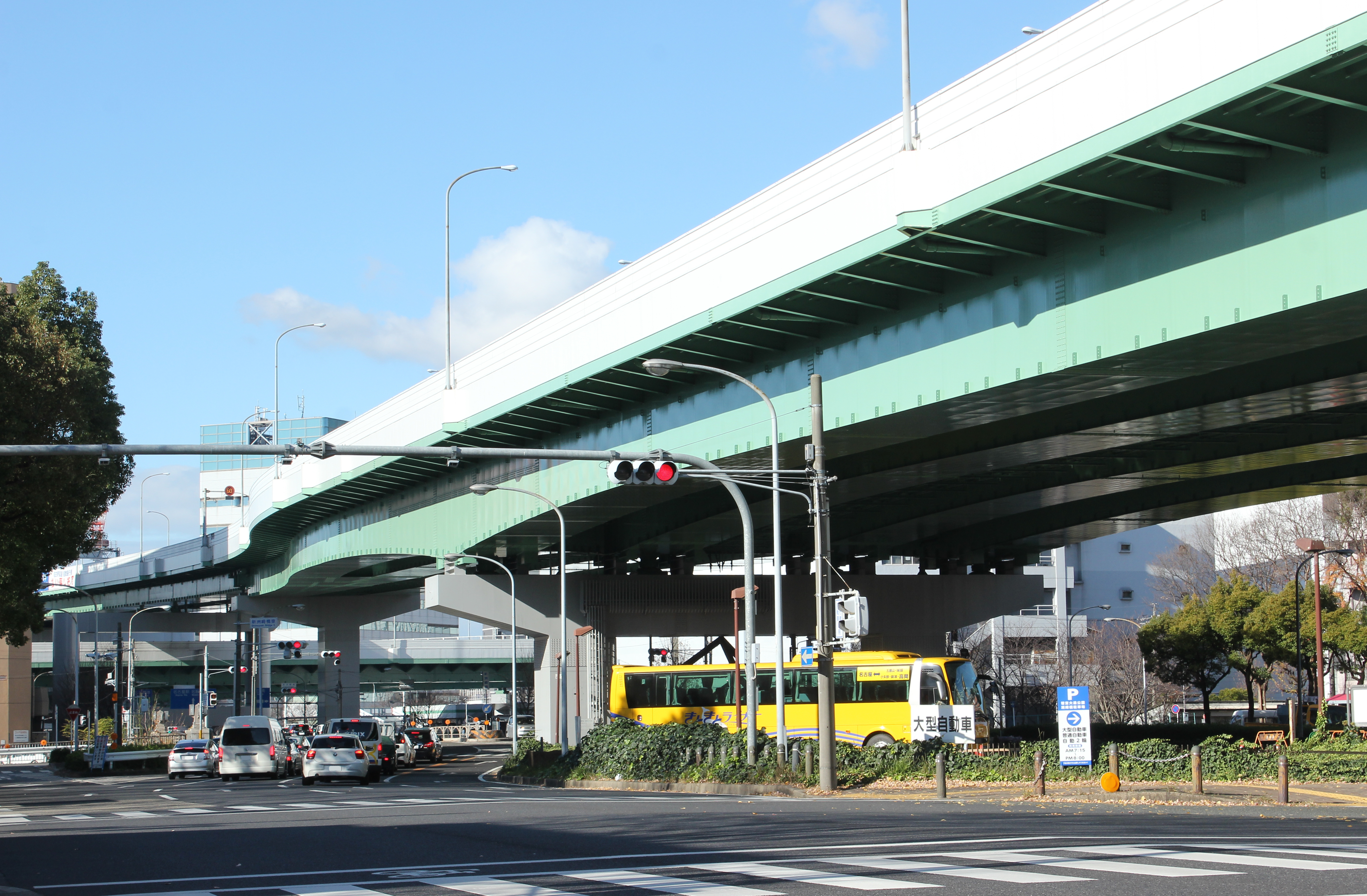 若宮大通 名古屋市中区大須付近